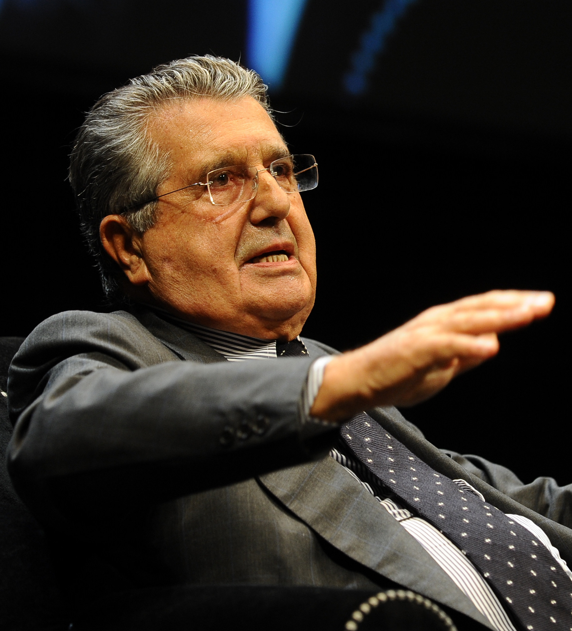 Carlo De Benedetti al Festival dell'Economia di Trento.